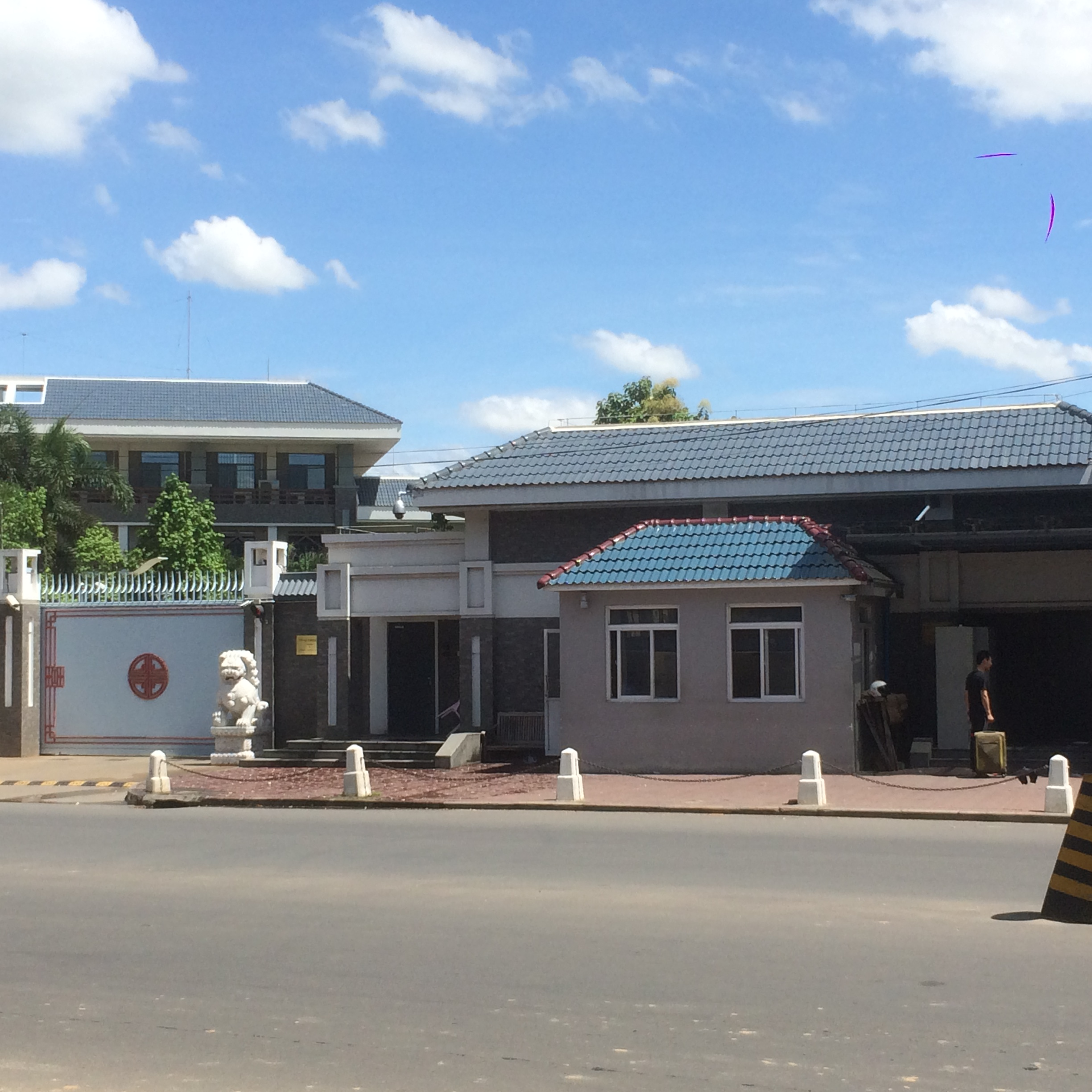 Đại Sứ Quán Trung Quốc - Phnôm Penh